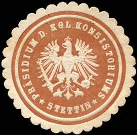 Sealing stamp Title: Präsidium des Königlichen Konsistoriums - Stettin Description: weiß, hellbraun, geprägt Place: Stettin size: 4 cm